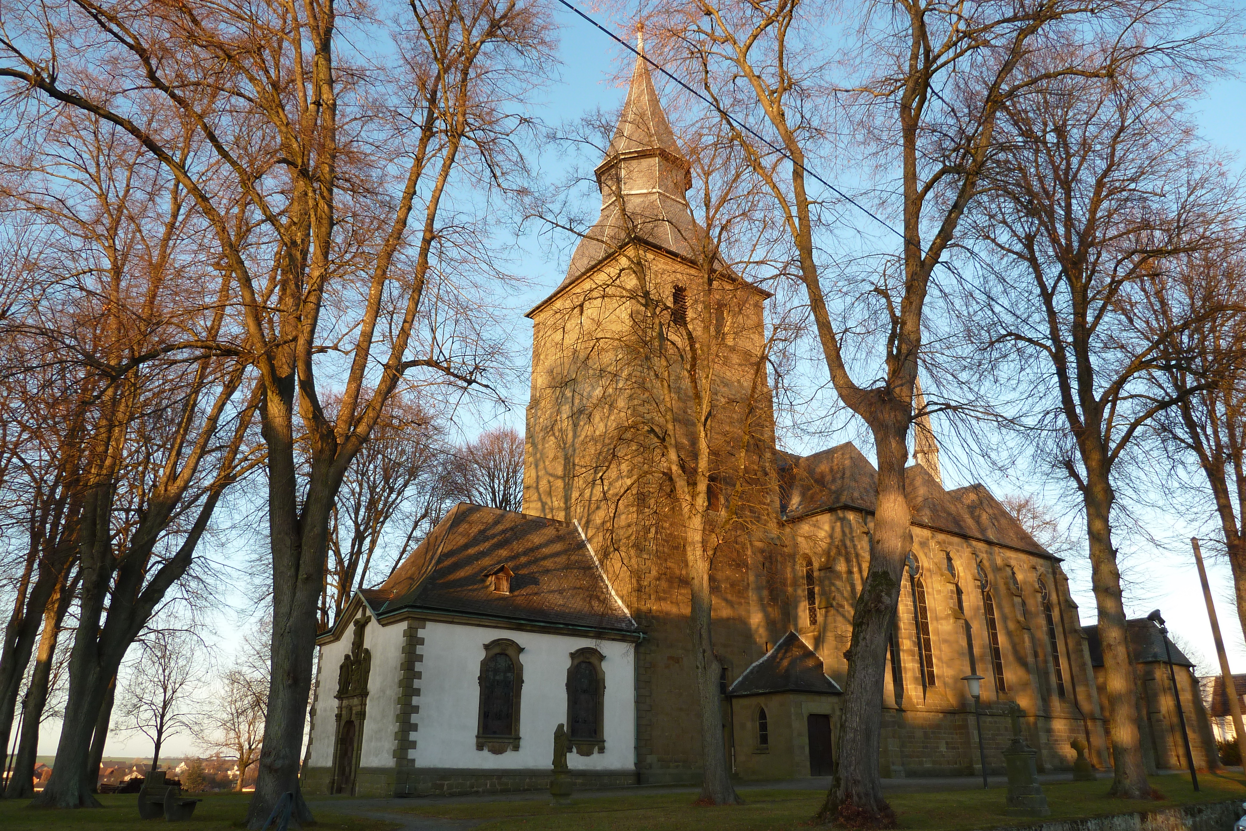 Die St.-Johannes-Baptist-Kirche in Rüthen.